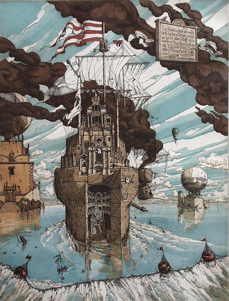 Robert C. Rore WV1093 "Das Narrenschiff", Radierung von drei Platten, 40x30cm, 1985